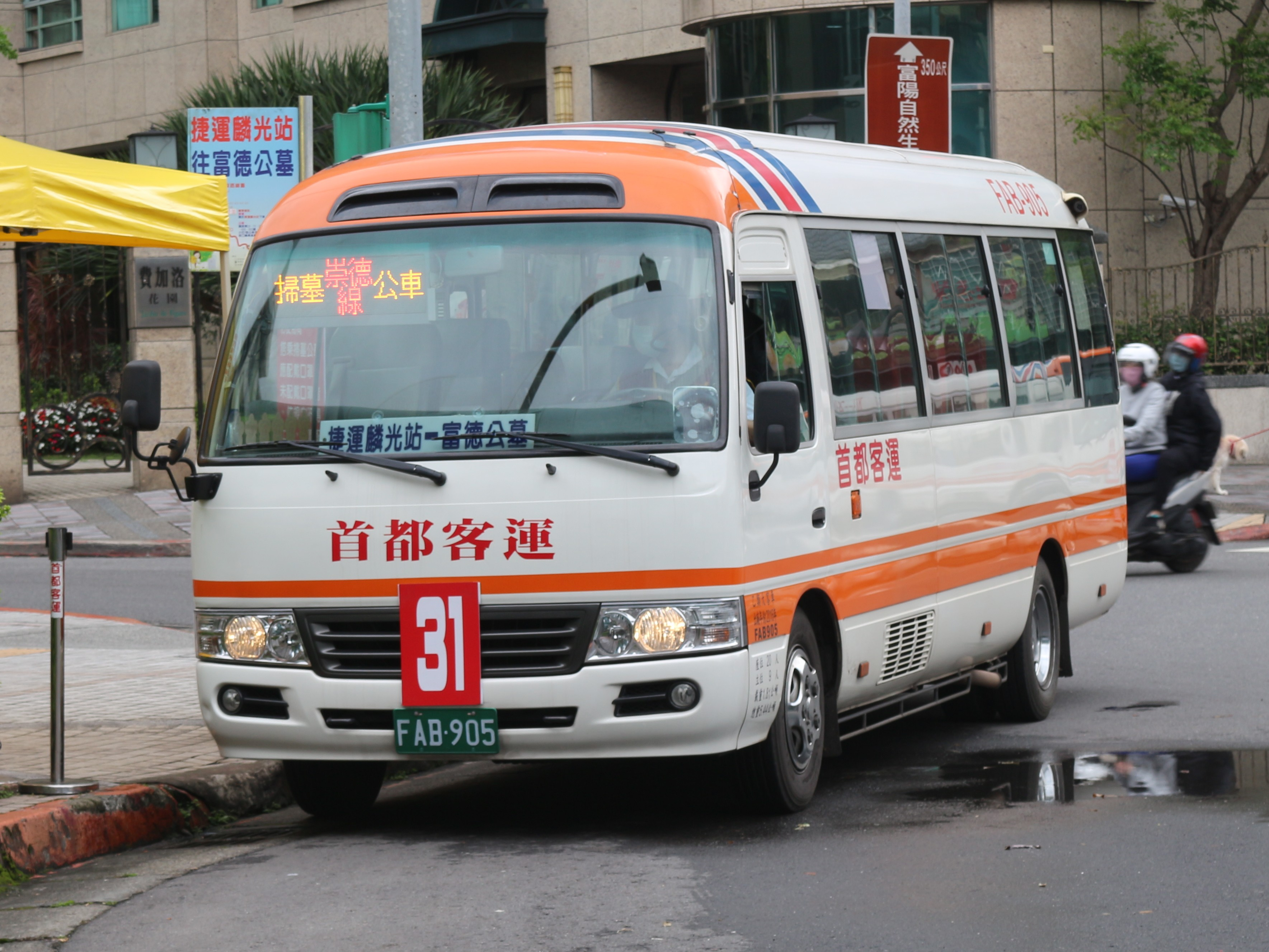 首都客運 2016 TOYOTA COASTER XZB50L-ZEMSYR FAB-905